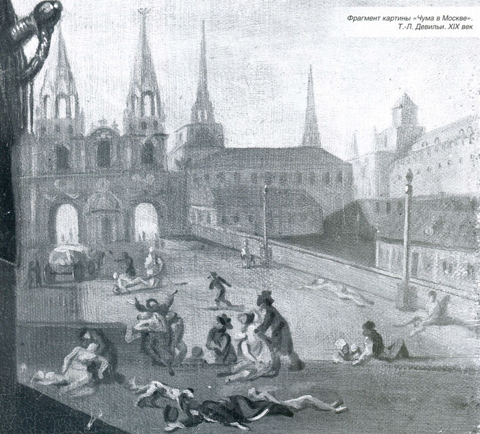 Чумной бунт в Москве (1771); "Чума в Москве"